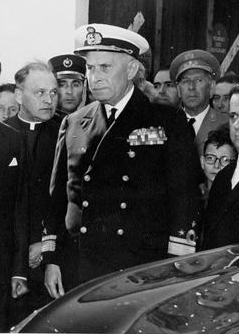 O Presidente Américo Tomás numa visita em 24 de Outubro de 1963 aquando da inauguração das obras de reconstrução das aldeias de Vale do Rio e Casalinho.